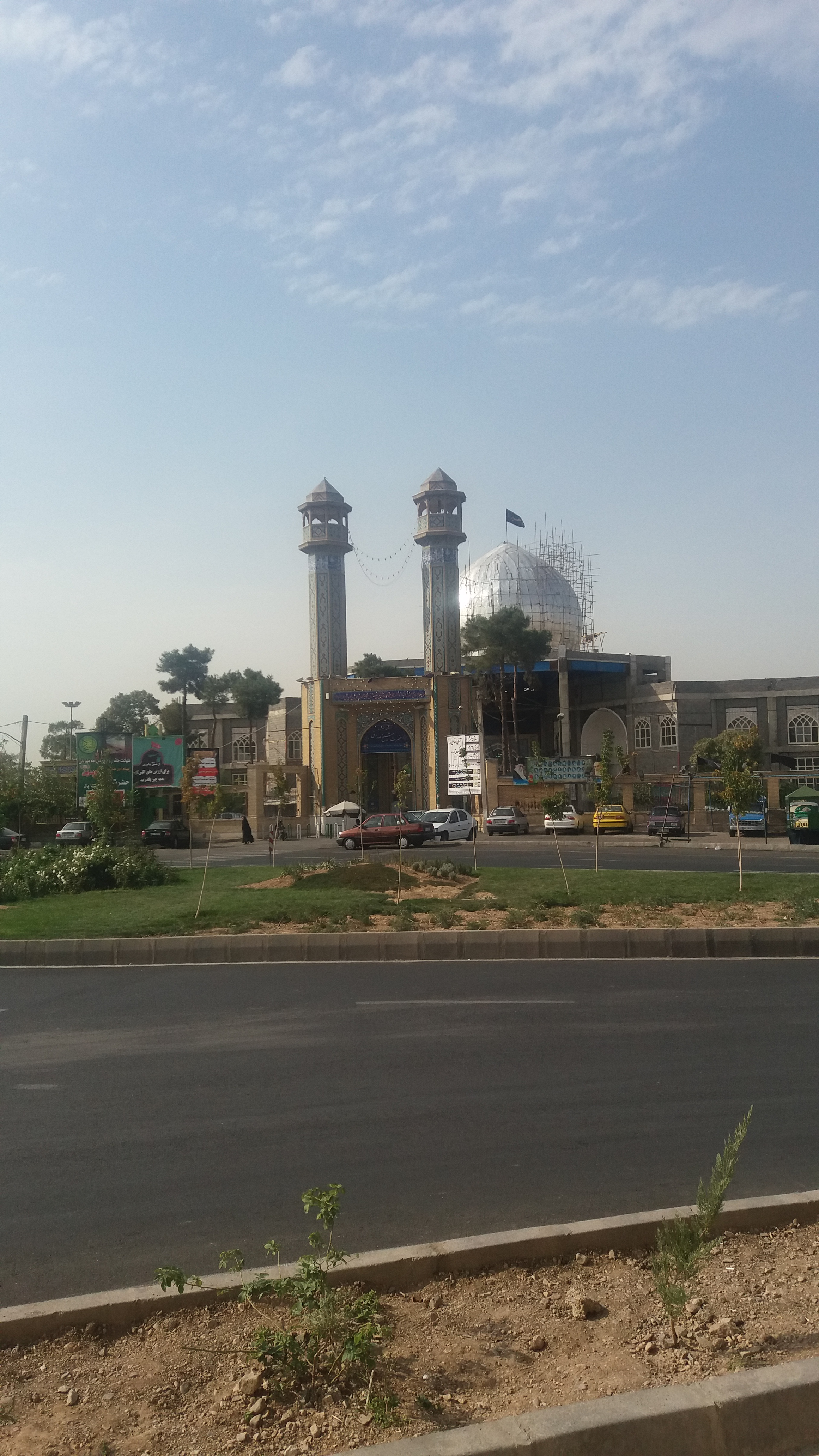 نمایی از آرامگاه شیخ صدوق (آرامگاه ابن بابویه) - گورستان ابن بابویه - آبان ۱۳۹۴